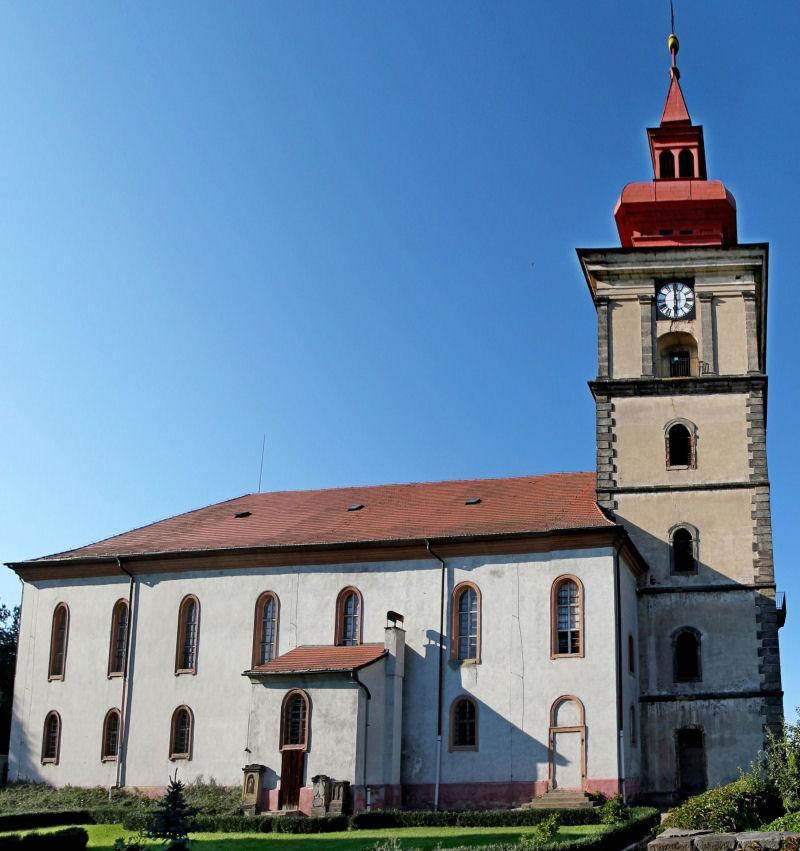 Kostel sv. Petra a Pavla, Mimoň, Náměstí Čsl. armády